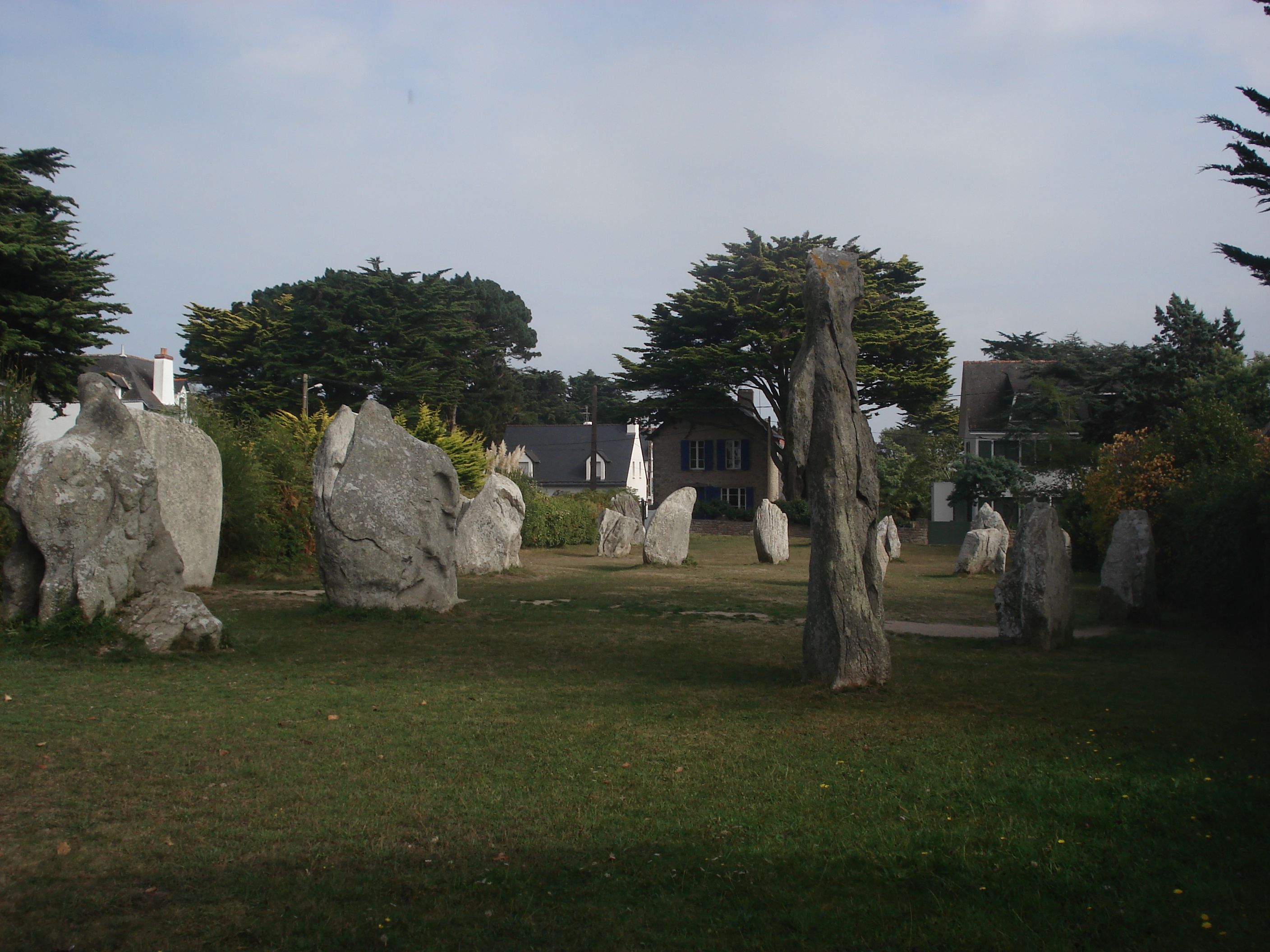 Alignements de Kerbourgnec